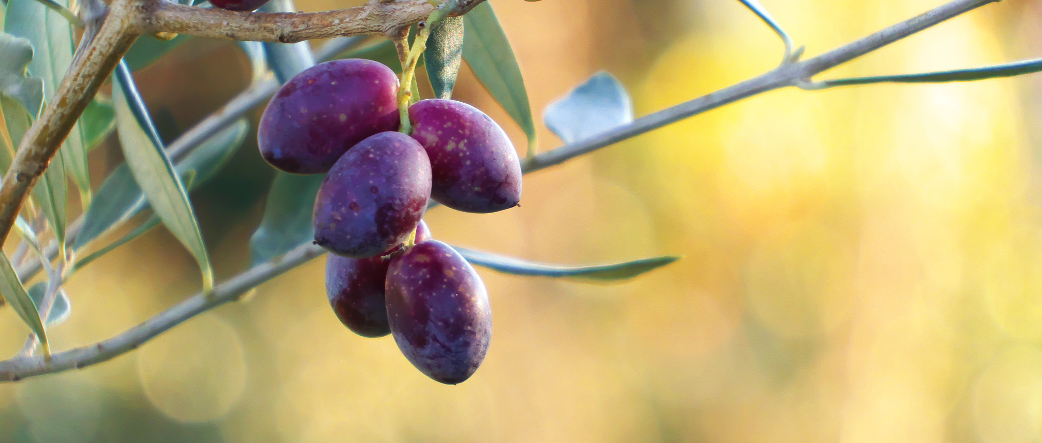 500px provided description: Olive Fruits [#tree ,#fruits ,#fruit ,#olive]